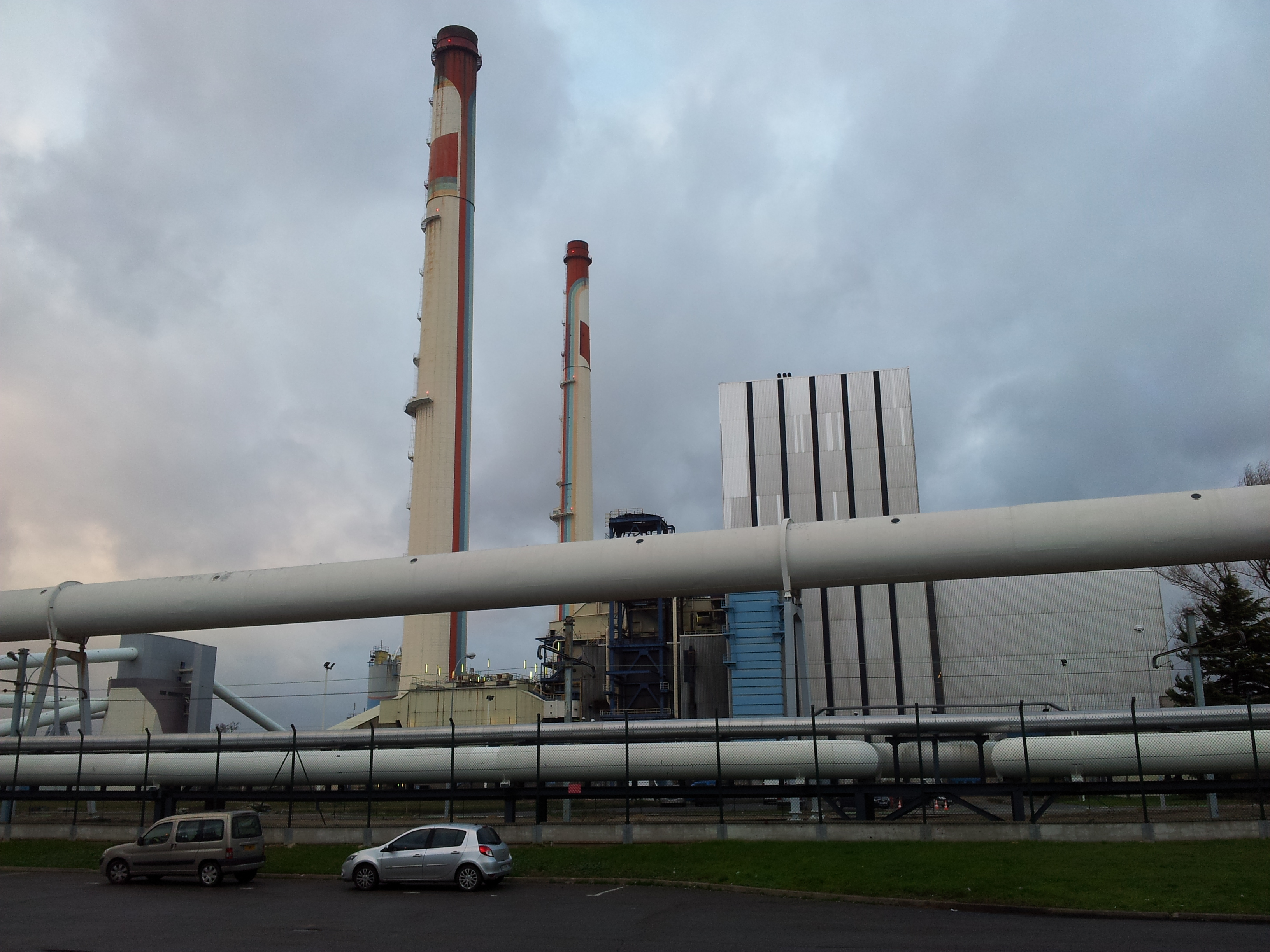 Usine électrique de Vitry-sur-Seine